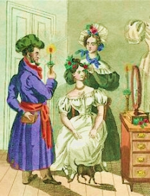 Postkartenmotiv des Biedermeier (~1815-1850)